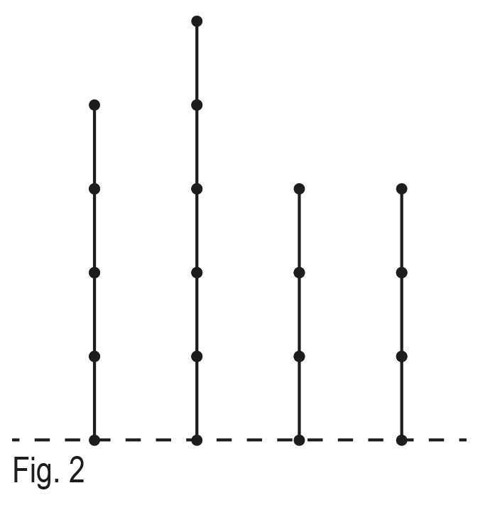 bambou